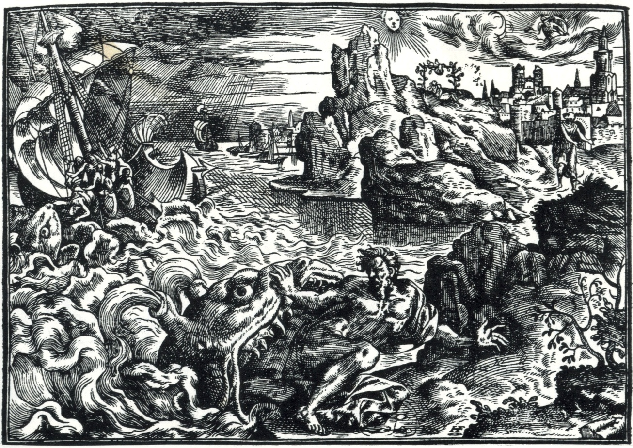 Jonáš vyvrhován velrybou na břeh, dřevoryt Melantrichovy Bible z roku 1570